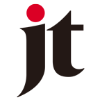 The Japan Times ロゴ